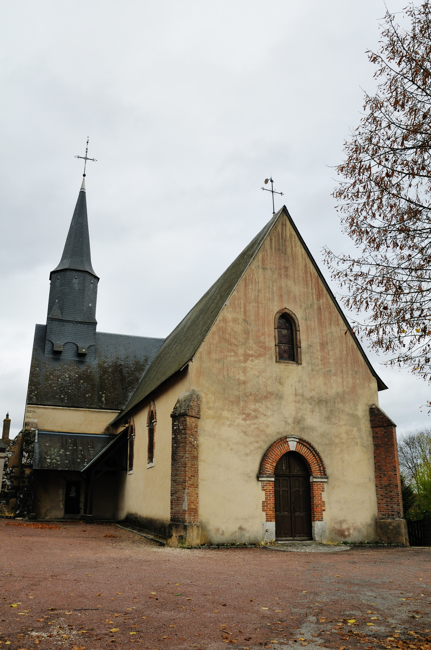 Église Saint-Martin, Ménétréol-sur-Sauldre, Cher, France